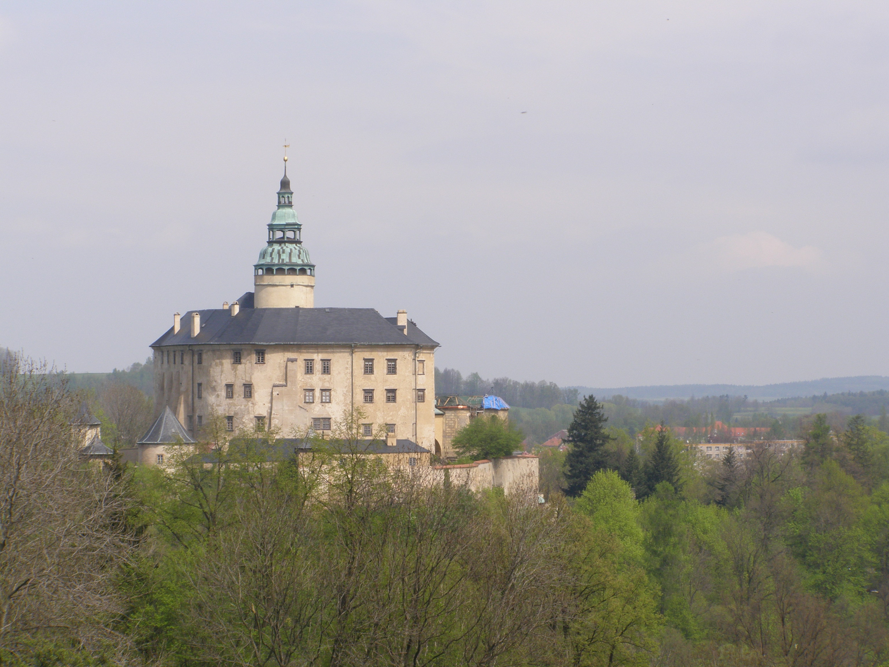 Frýdlant, pohled z lokality Hág na zámek